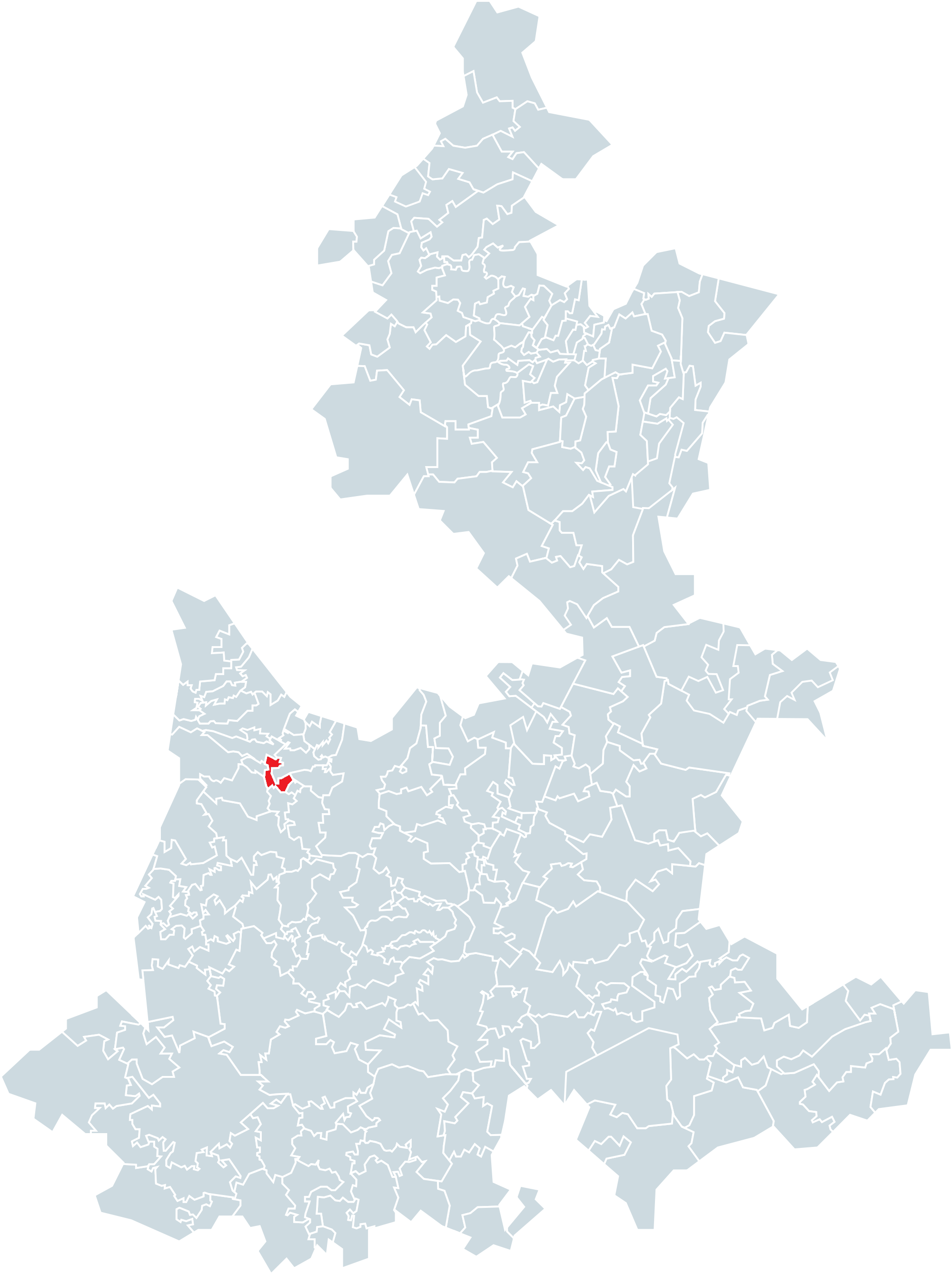 Municipio de San Jerónimo Tecuanipan